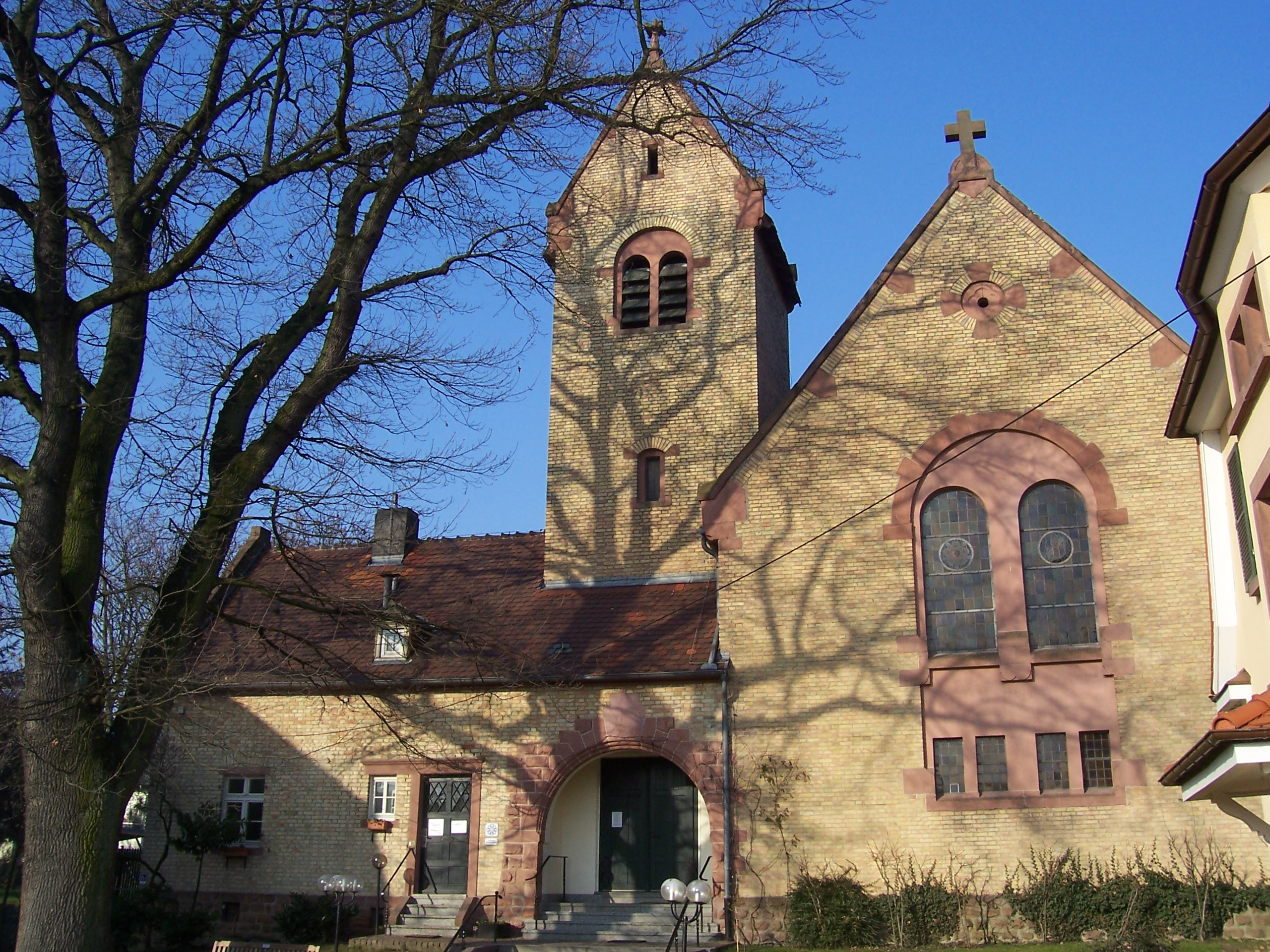 Die evangelische Auferstehungskirche in Viernheim am 16. Januar 2006 My own photo